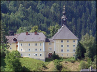 Schlosskirche Donnersbach